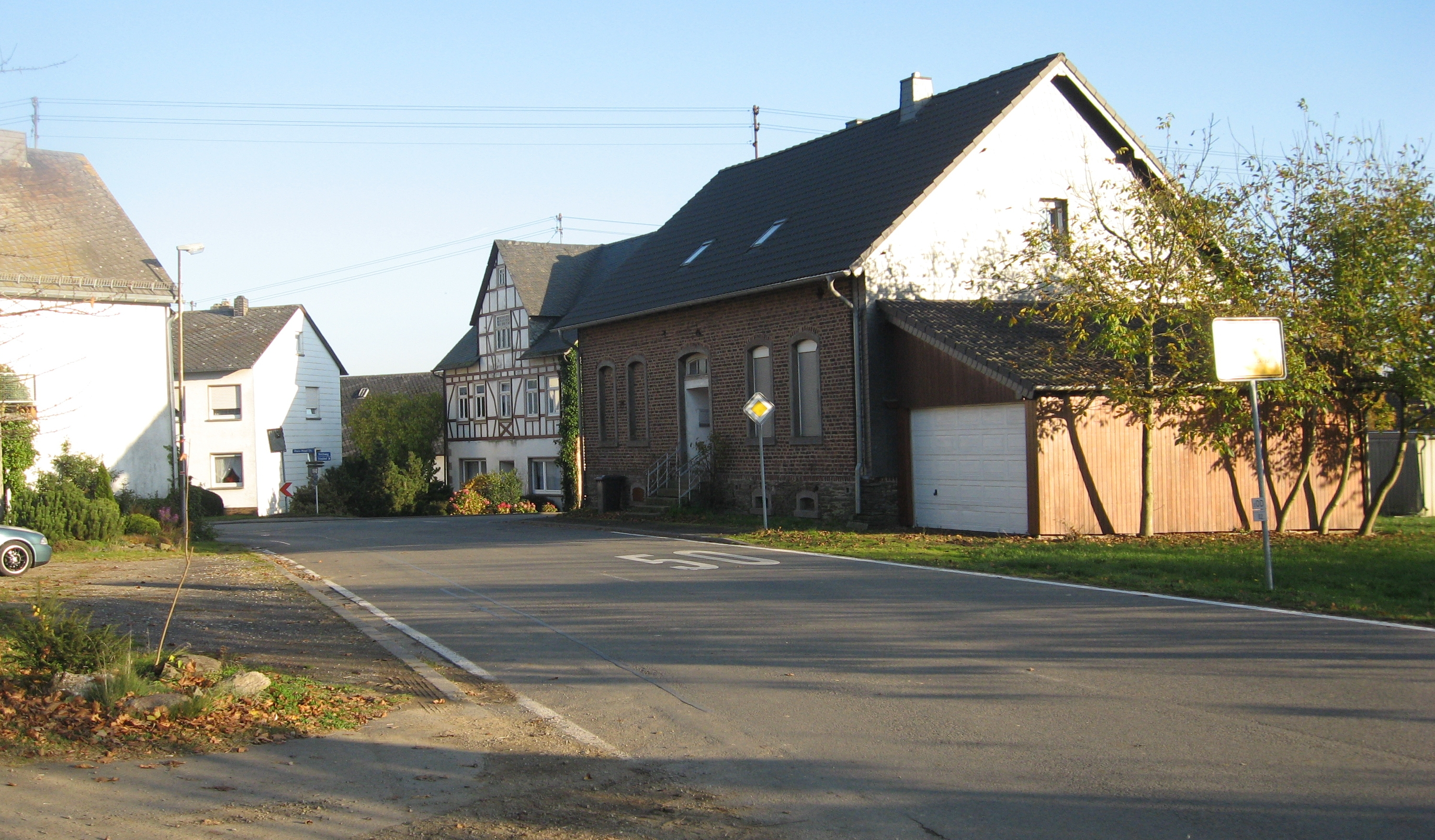 Hungenroth. Bildmitte: Rhein-Mosel-Straße 2; dahinter Kirchweg 1 (mit Zwerchhaus).